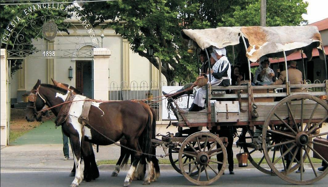 Festejos de los 150 años de la migración Valdense en Uruguay, Carro típico de la época 1856, y descendientes de los migrantes con vestimenta típica.